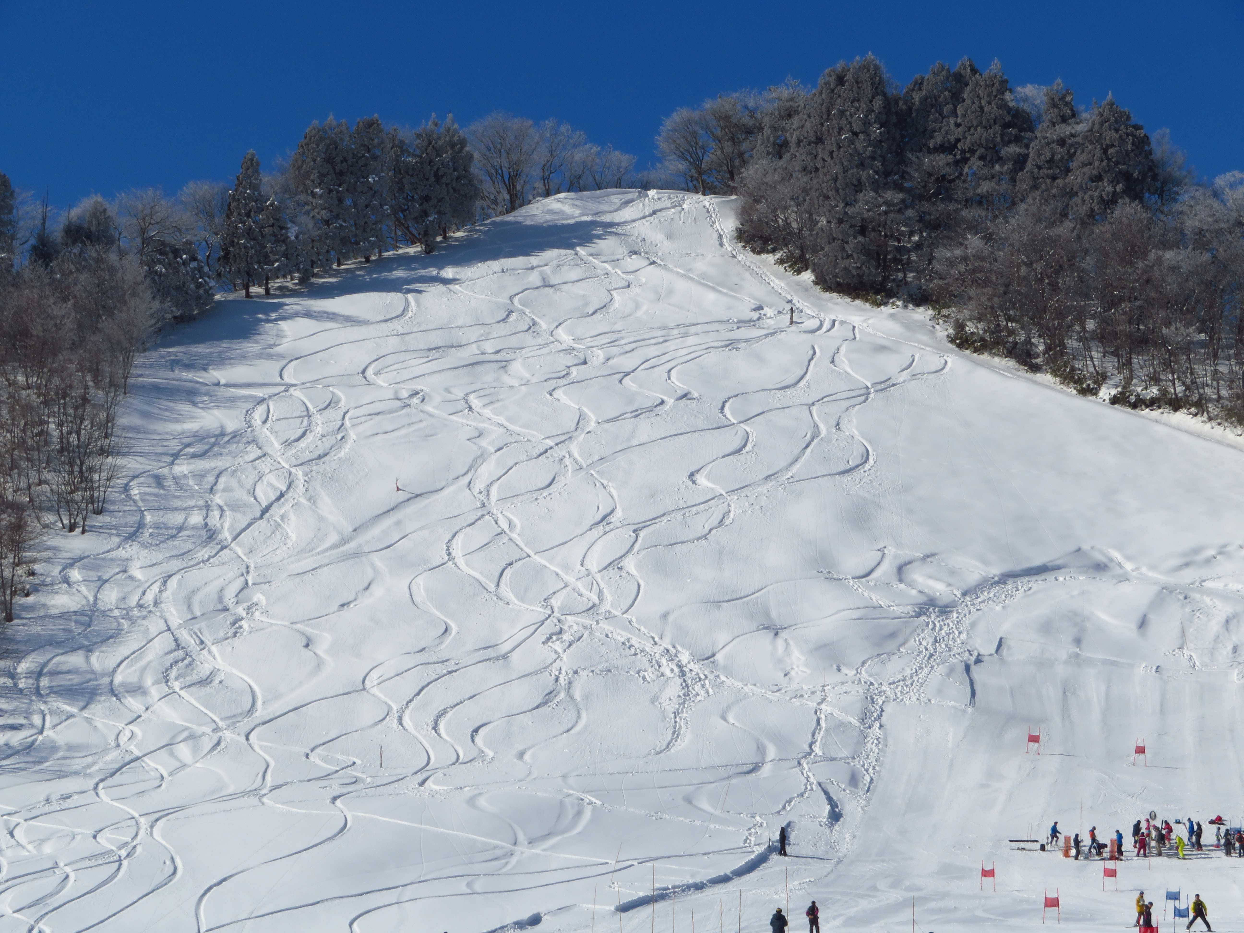 北秋田市営薬師山スキー場 Canon PowerShot SX720 HS